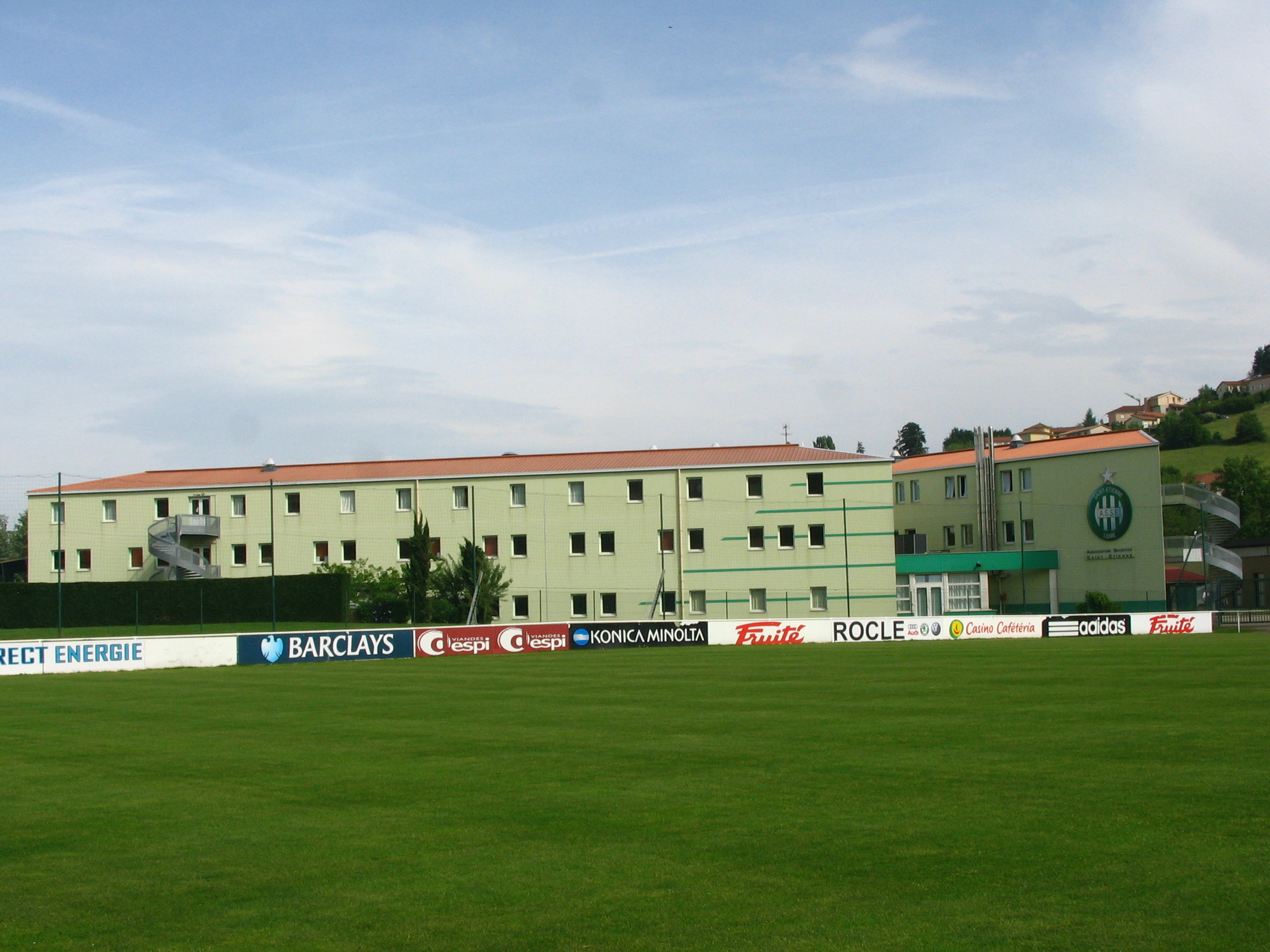 Une partie des installations de l'ASSE à l'Etrat, Loire.